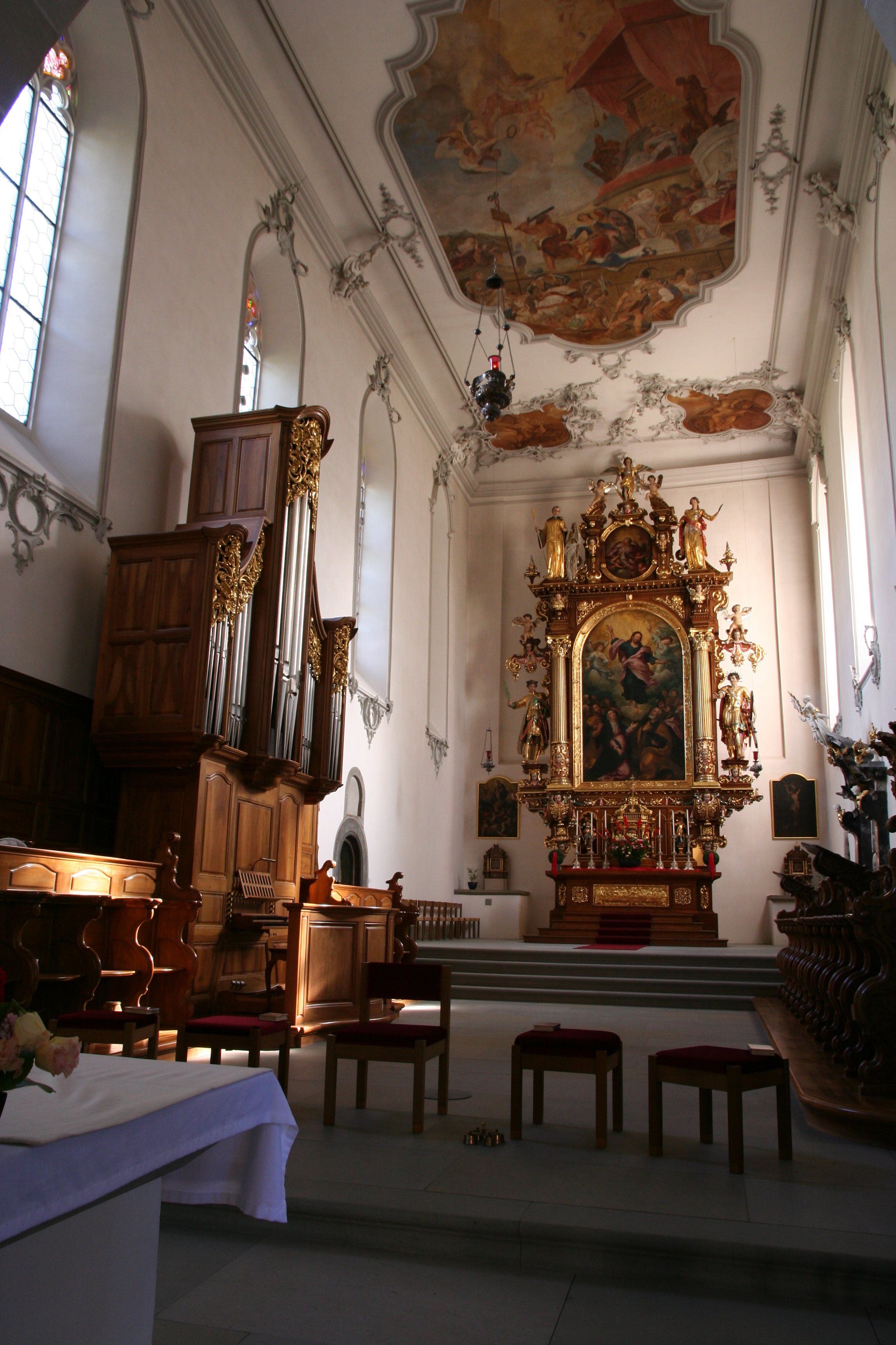 röm.-kath. Pfarrkirche St. Pelagius in Bischofszell